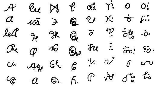 Eskaya script